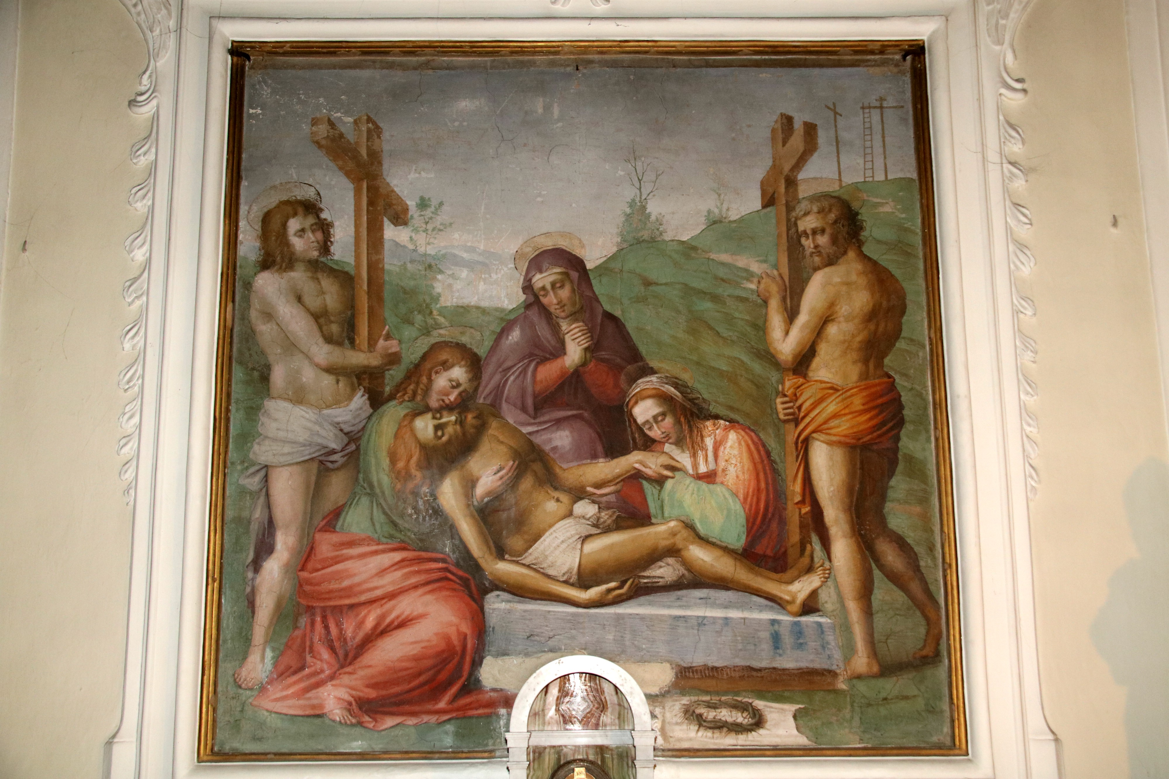 Chiesa di Santa Maria (Marcialla)